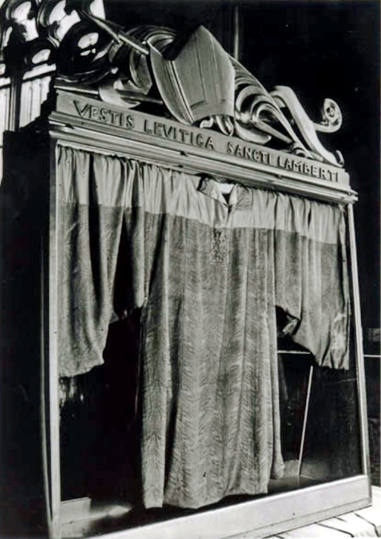 Zogenaamd Levietenkleed van Sint-Lambertus in een speciaal daarvoor vervaardigde kast in de schatkamer van de Onze-Lieve-Vrouwebasiliek in Maastricht. Fotocollectie RHCL Maastricht, GAM 23369.